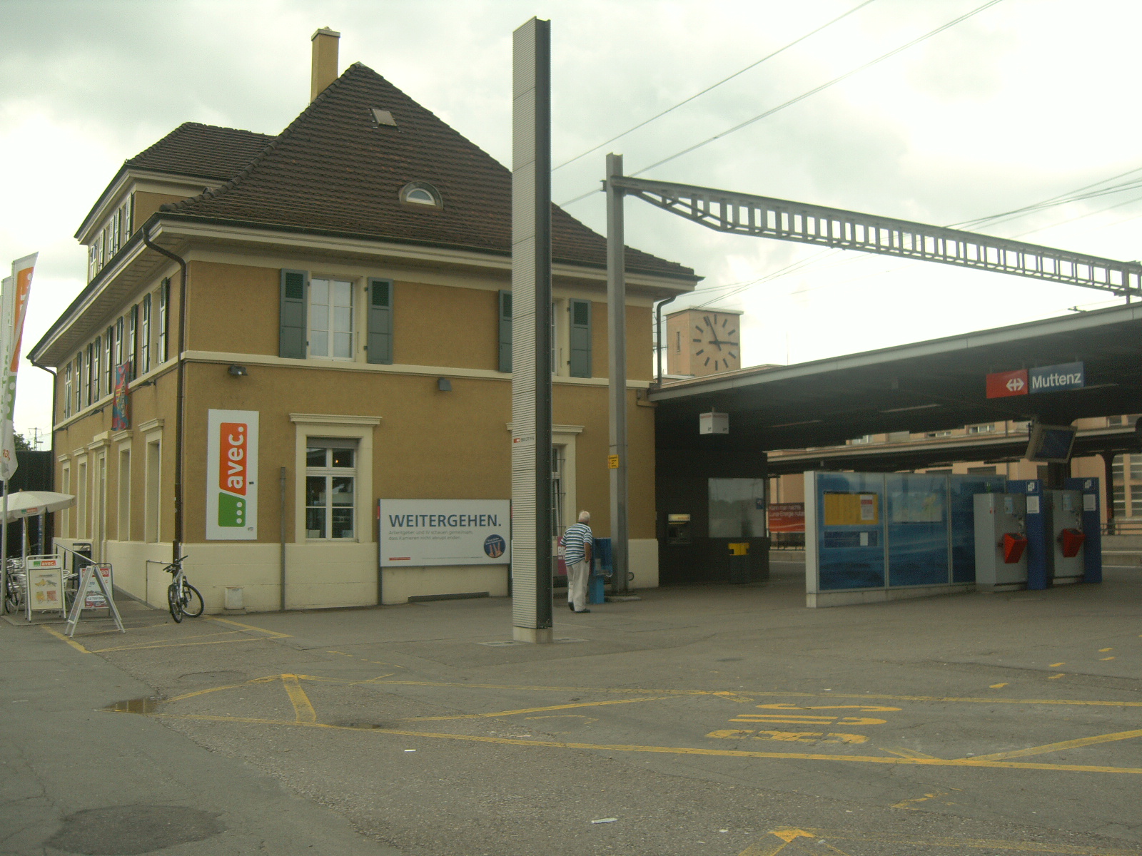 Bahnhof Muttenz.